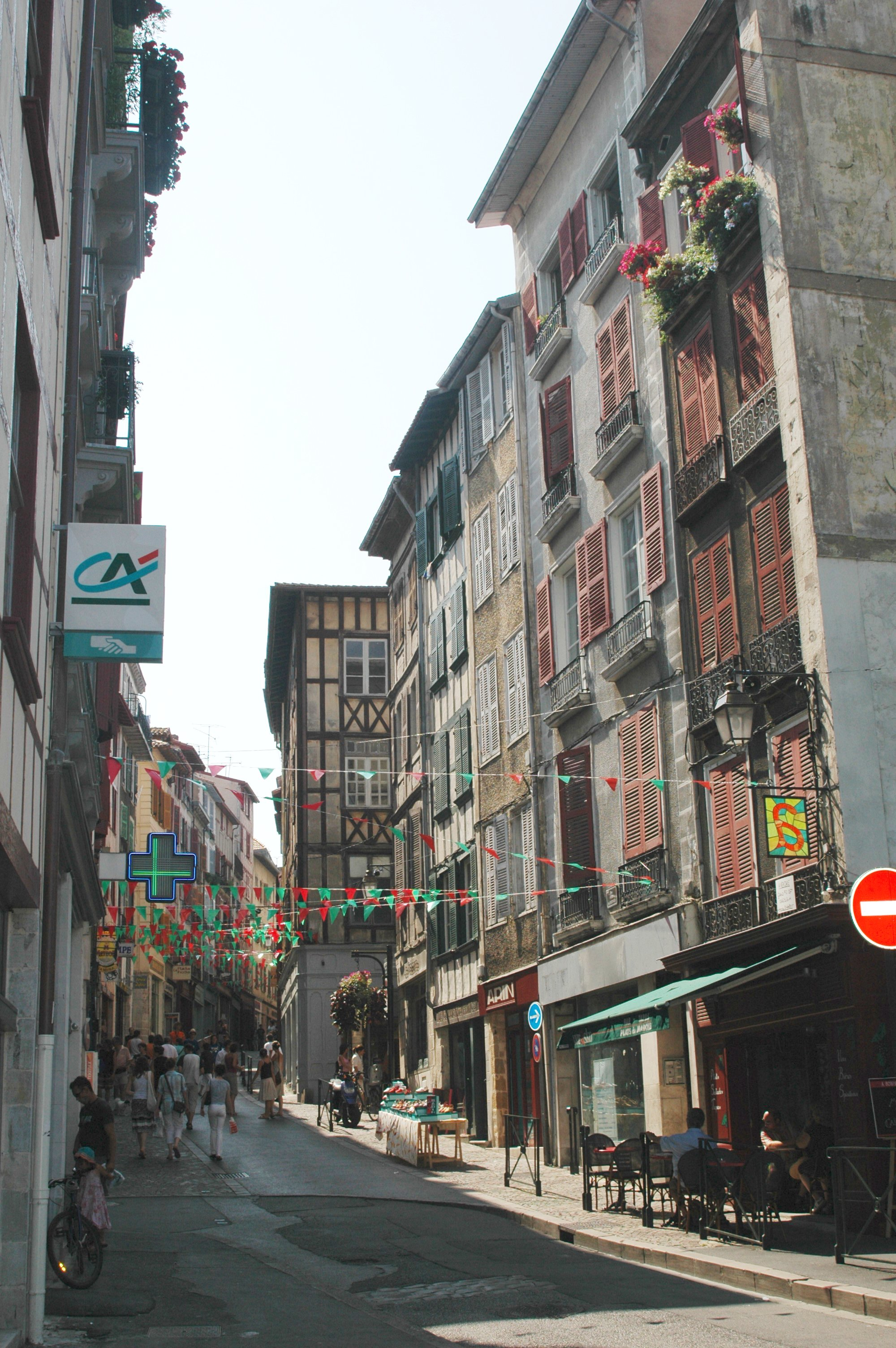 Bayonne, rue Poissonnerie. Photo prise le 15/07/06 par Harrieta171